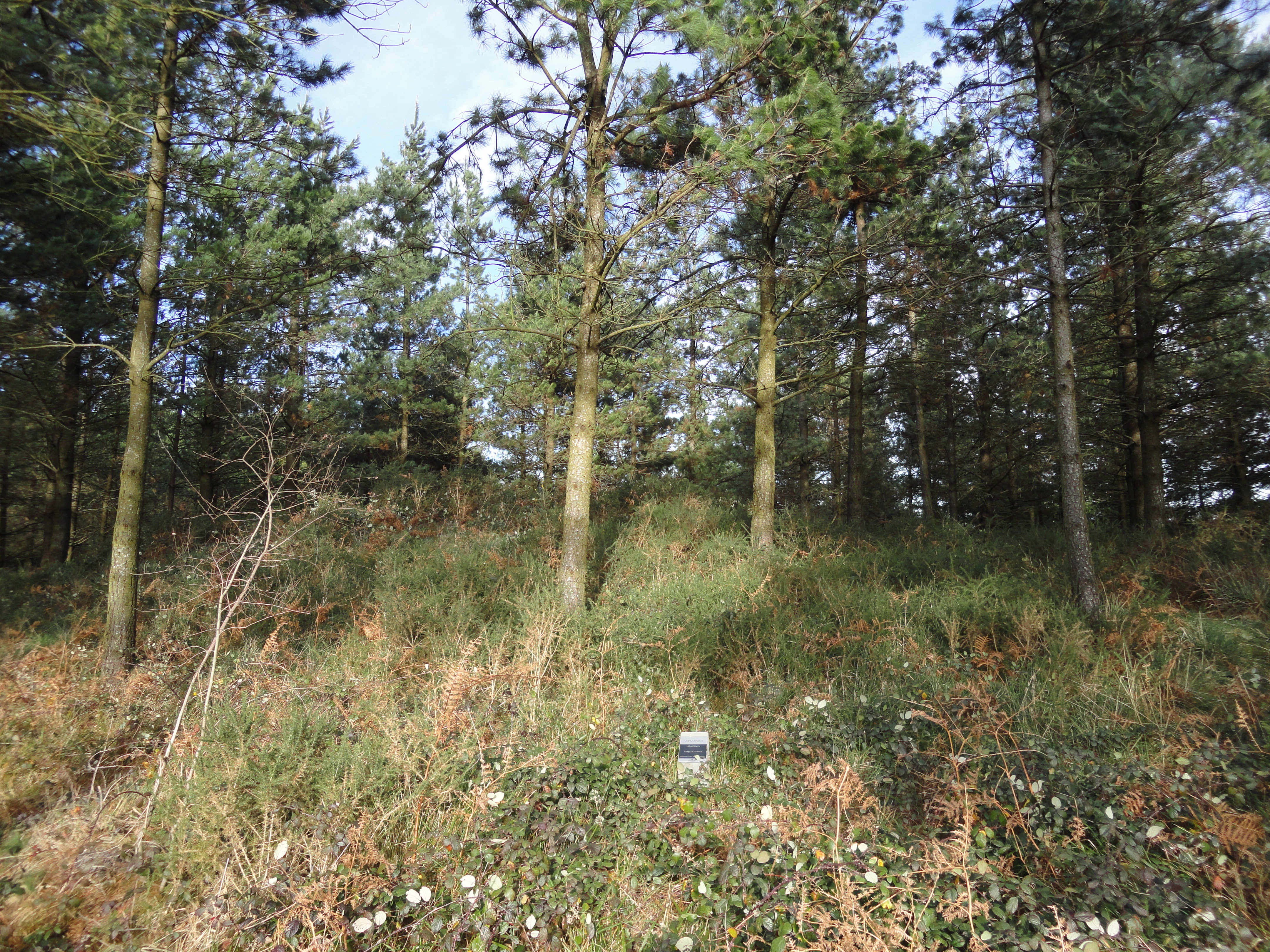 Lasartegain tumulua